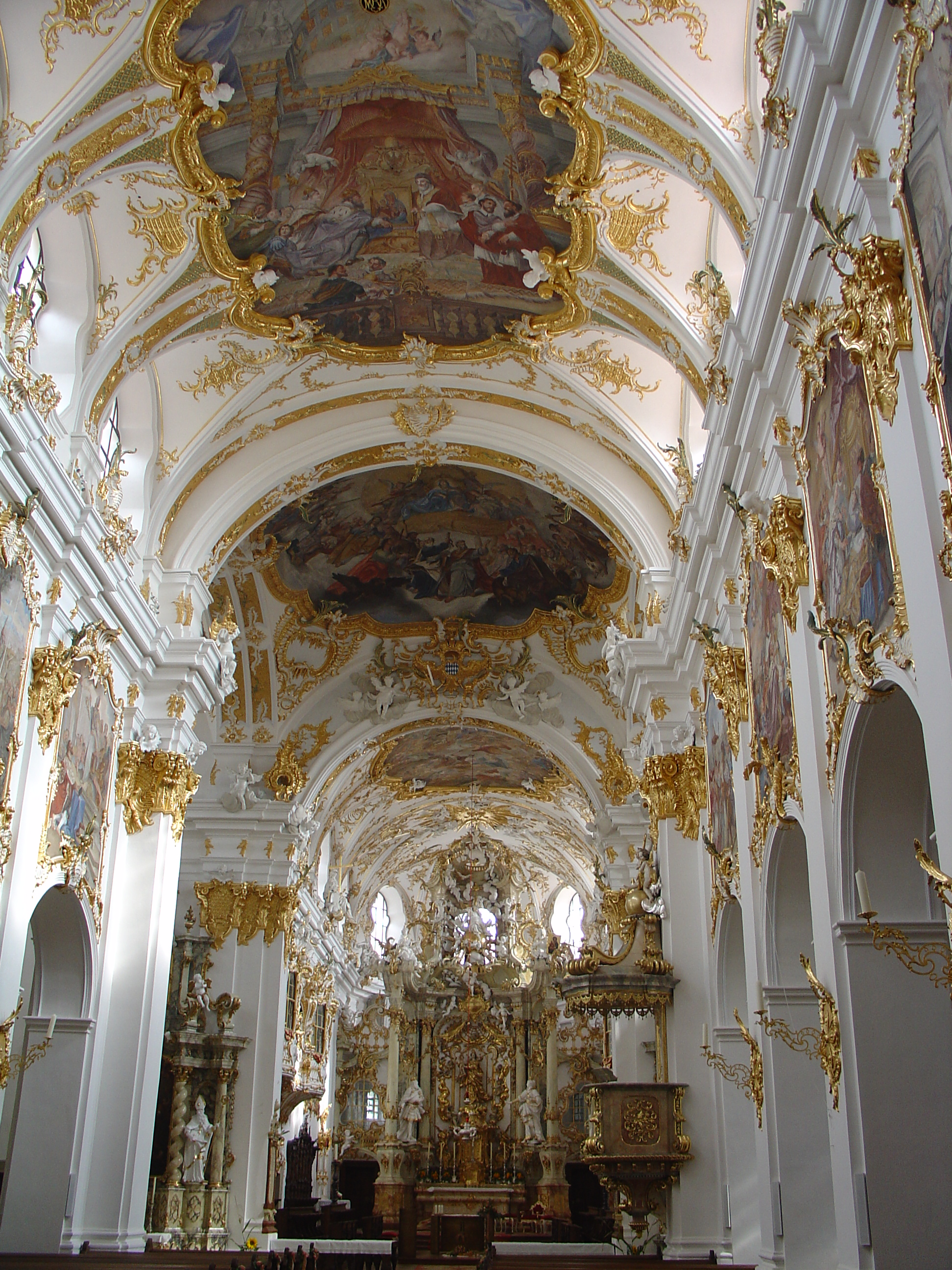 Alte Kapelle in Regensburg